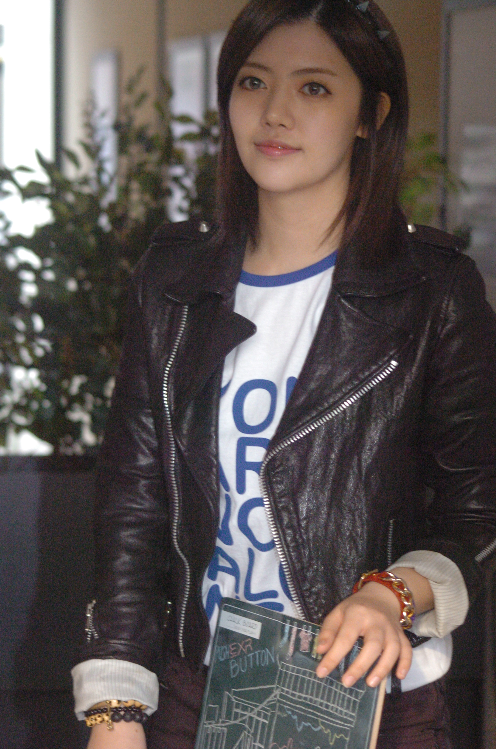 레슬링 시즌 & EXR 푸시 버튼과 콜라보레이션 런칭 10주년